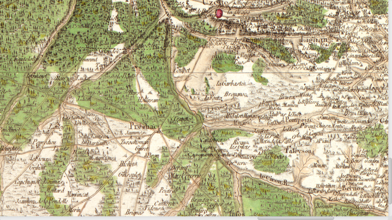 Carte de Cassini n°105 (Gironde, zoom sur Préchac et Bernos), 1756.